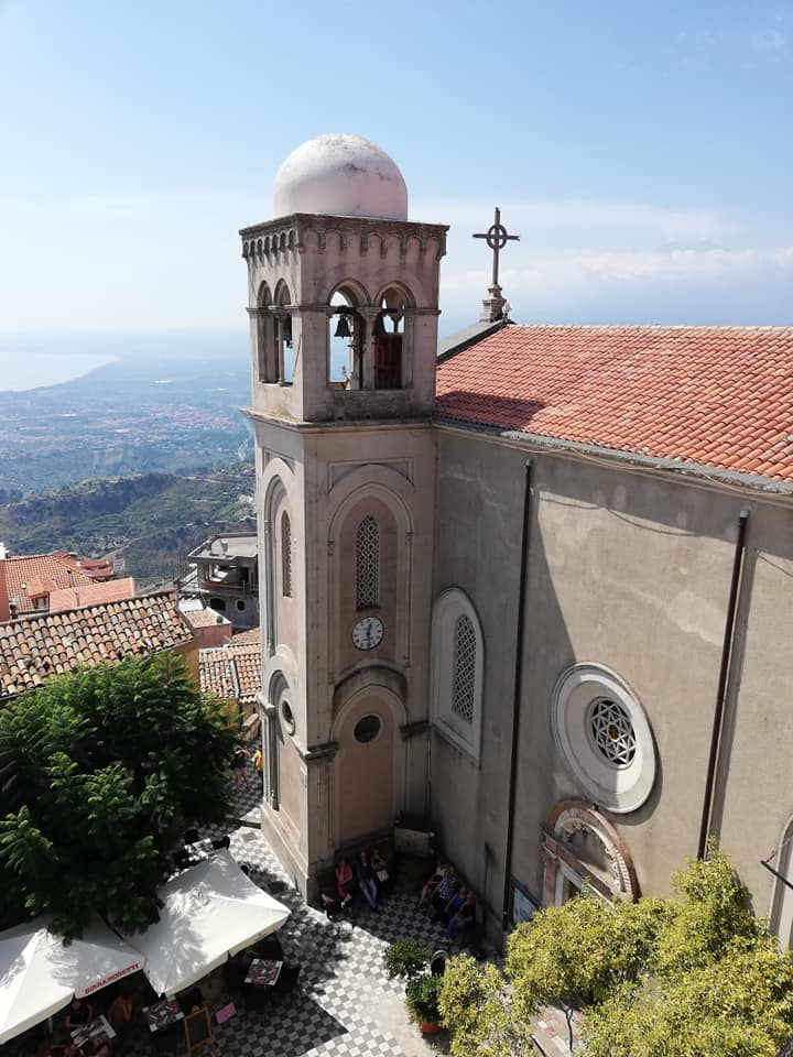 Campanile.